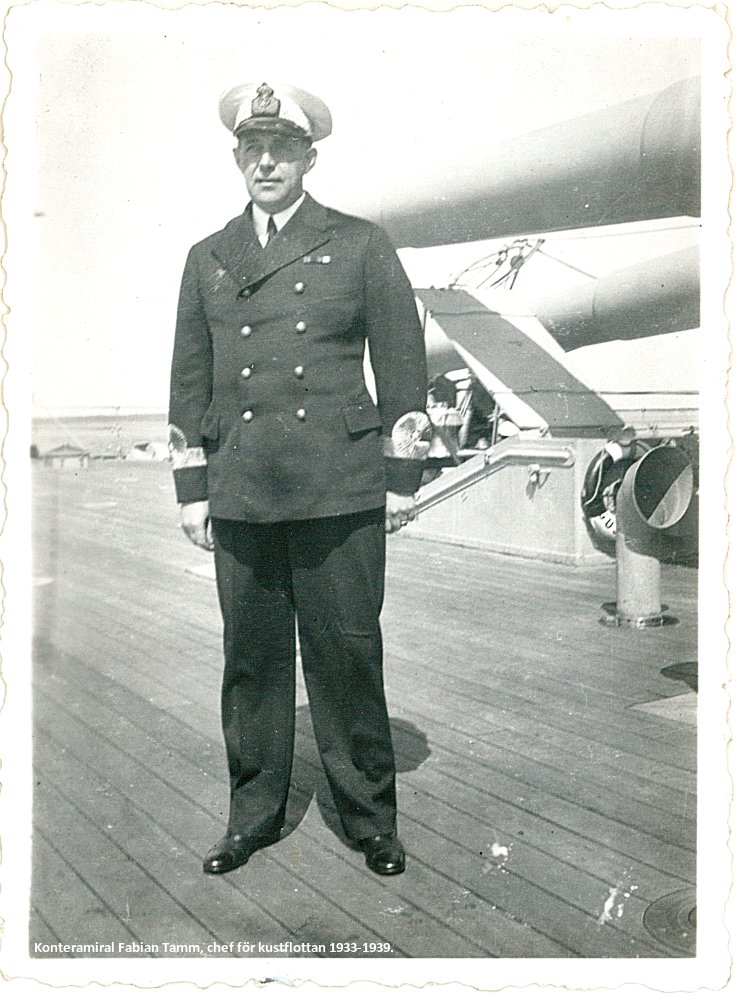 Fotot ur Jorge Lintrups familjealbum.